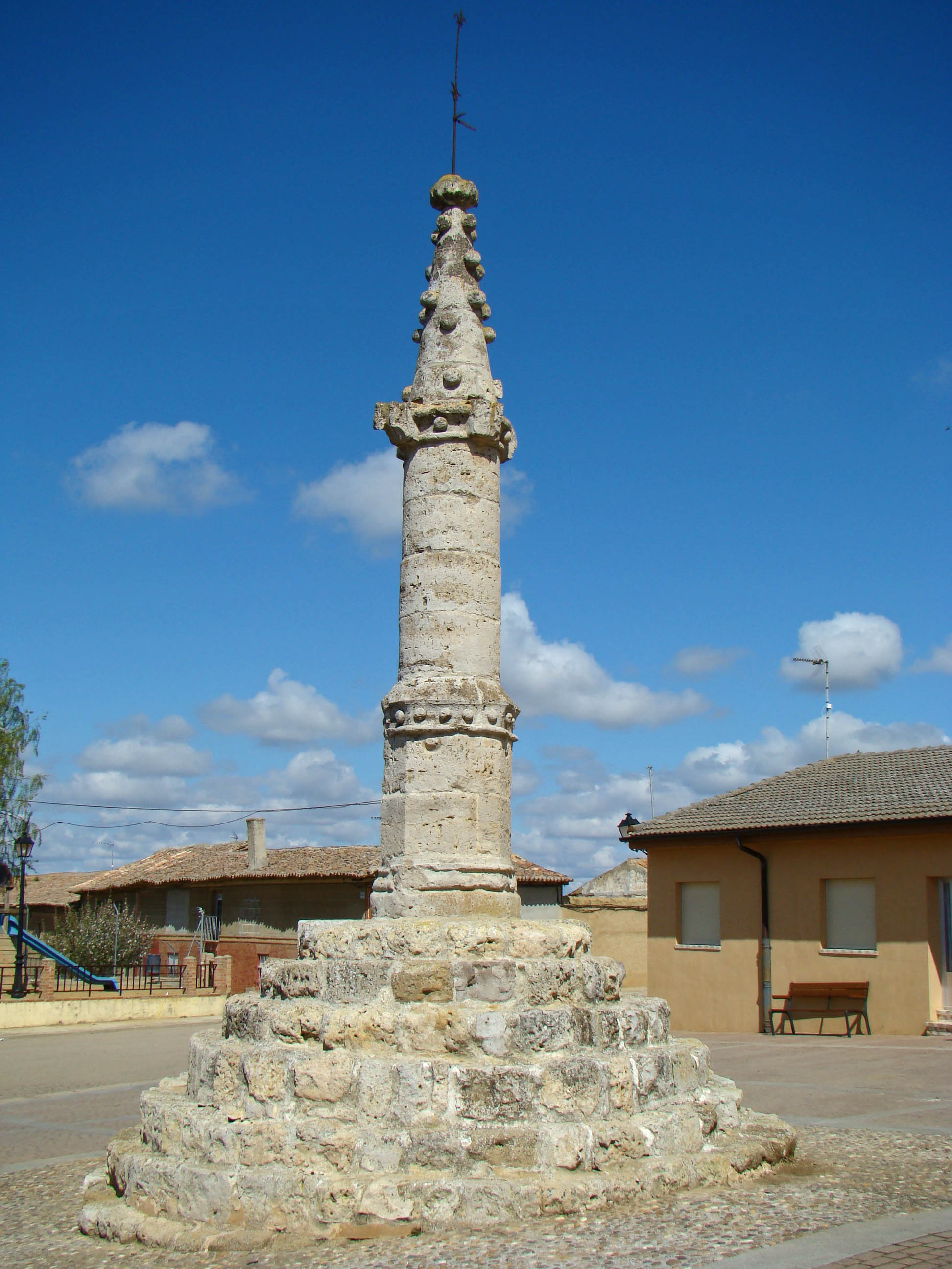 Aguilar de Campos, población española de la provincia de Valladolid. Rollo jurisdiccional de finales del siglo XVI situado frente a la iglesia de San Andrés.